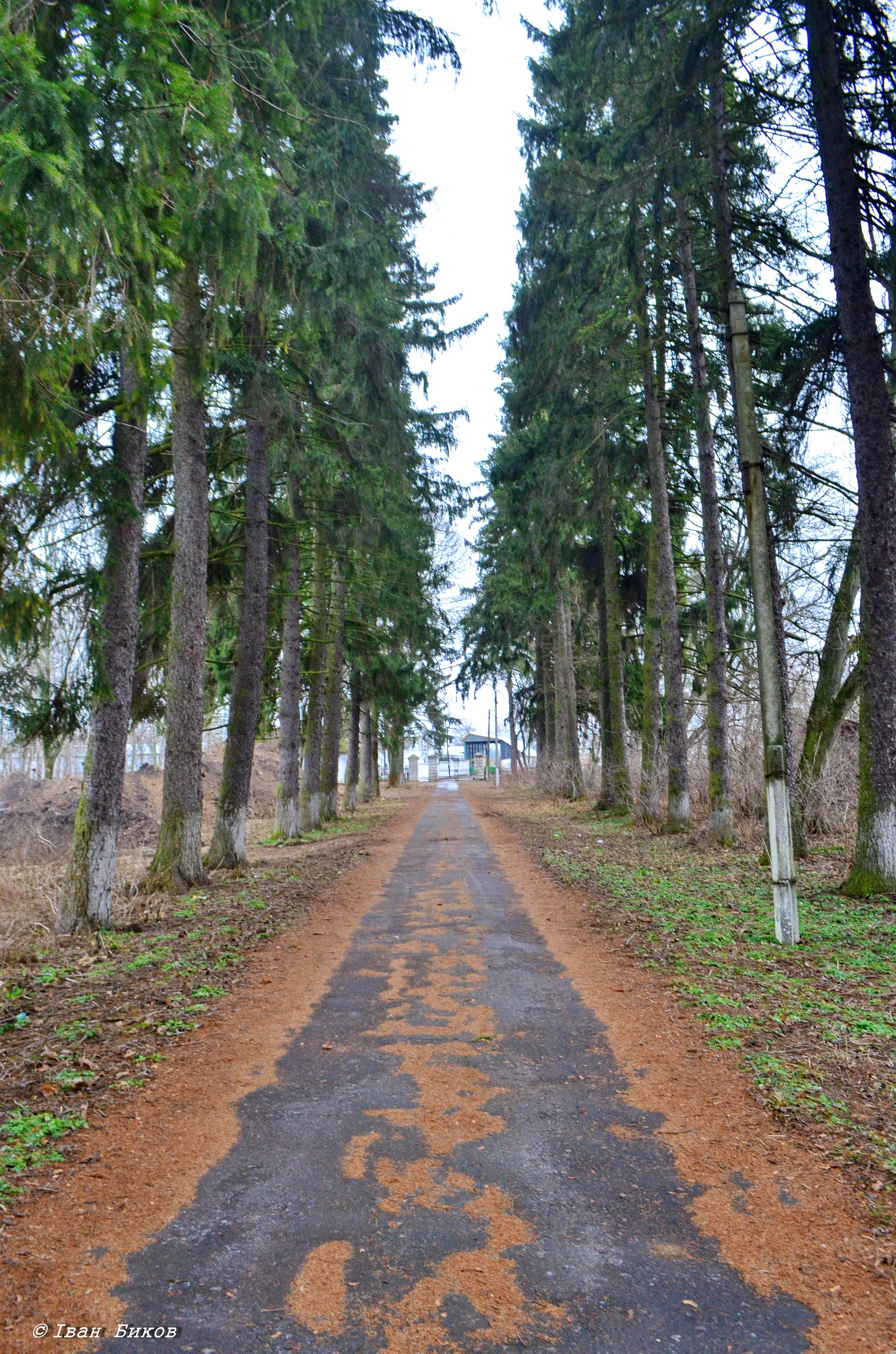 Парк, Тиниця, вул.Матросова, 3